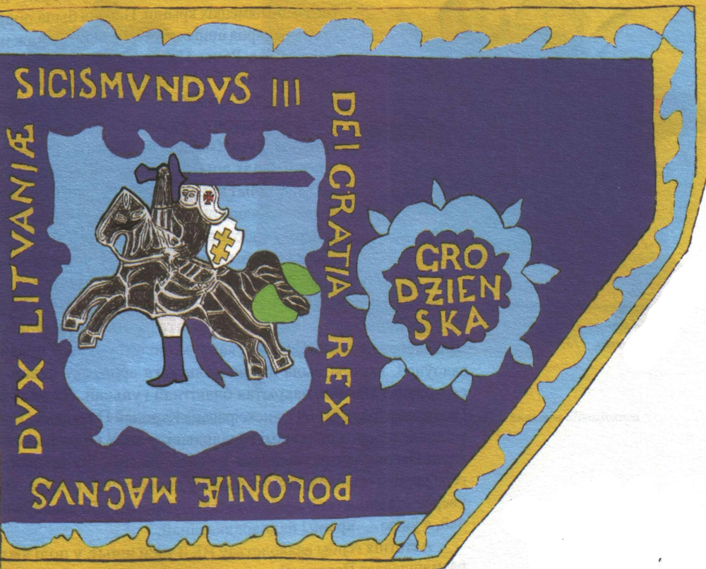 Беларуская (тарашкевіца): Харугва паспалітага рушаньня Гарадзенскага павету (Horadnia) Пагоняй (Pahonia)